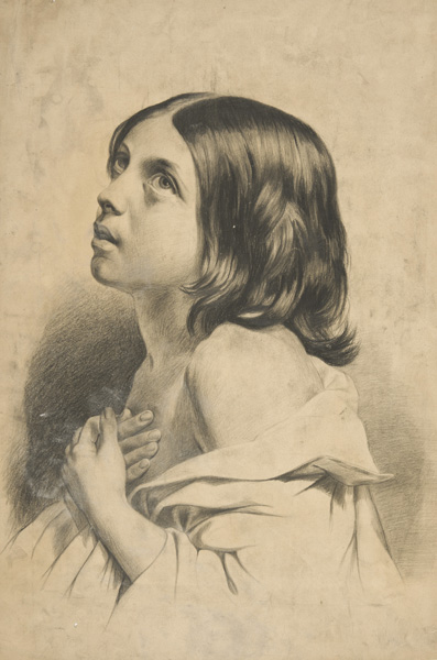 Dibujo. Retrato de niña.